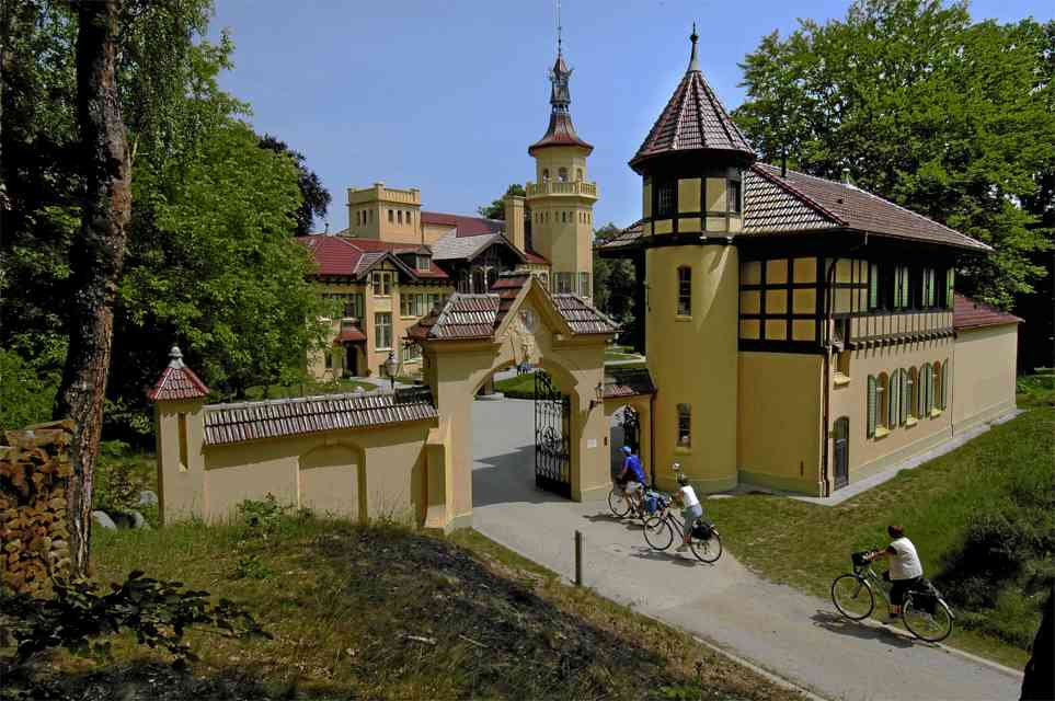 Schloss Hubertushöhe, Storkow